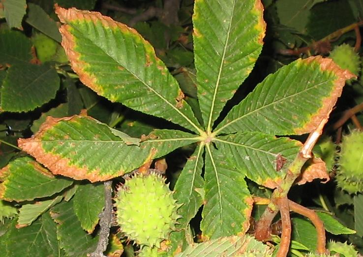 Fotografía digital realizada por Pablo Alberto Salguero Quiles. La foto está realizada en el Jardín botánico de Madrid, en septiembre, pertenece a la familia de las Sapindaceae, por lo que sus hojas son caducas. Se observan ya los primeros síntomas de la perdida de clorofila.